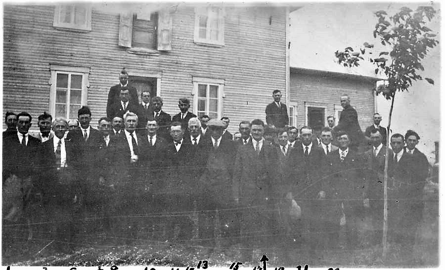 Comité de défense des cultivateurs lésés du Lac St-Jean, chez le président, M. Onésime Tremblay, de St-Jérôme. 1- Joseph Coulombe, 2- Onésime Tremblay, 3- Edouard Couture, 4- Adélard Perron, 5- Tommie Hamel, 6- Antoine Tremblay (Bernard), 7- Antoine Tremblay, fils d'Onésime, 8- John Gagnon, 9- Joseph Duguay, 10- Raoul Tremblay.